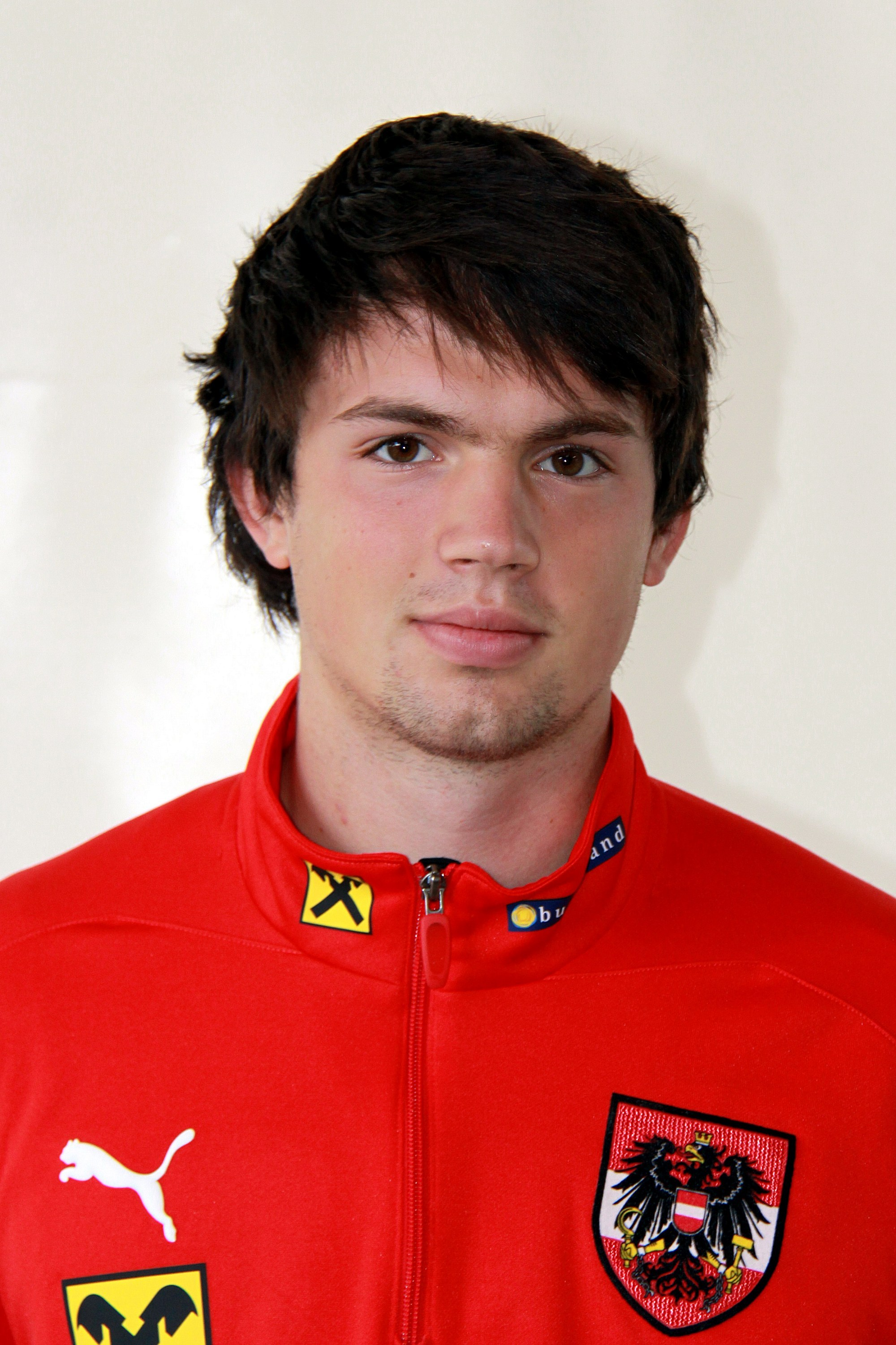 Andreas Tiffner (FK Austria Wien) - Österreichische Fußballnationalmannschaft (U-21-Männer)